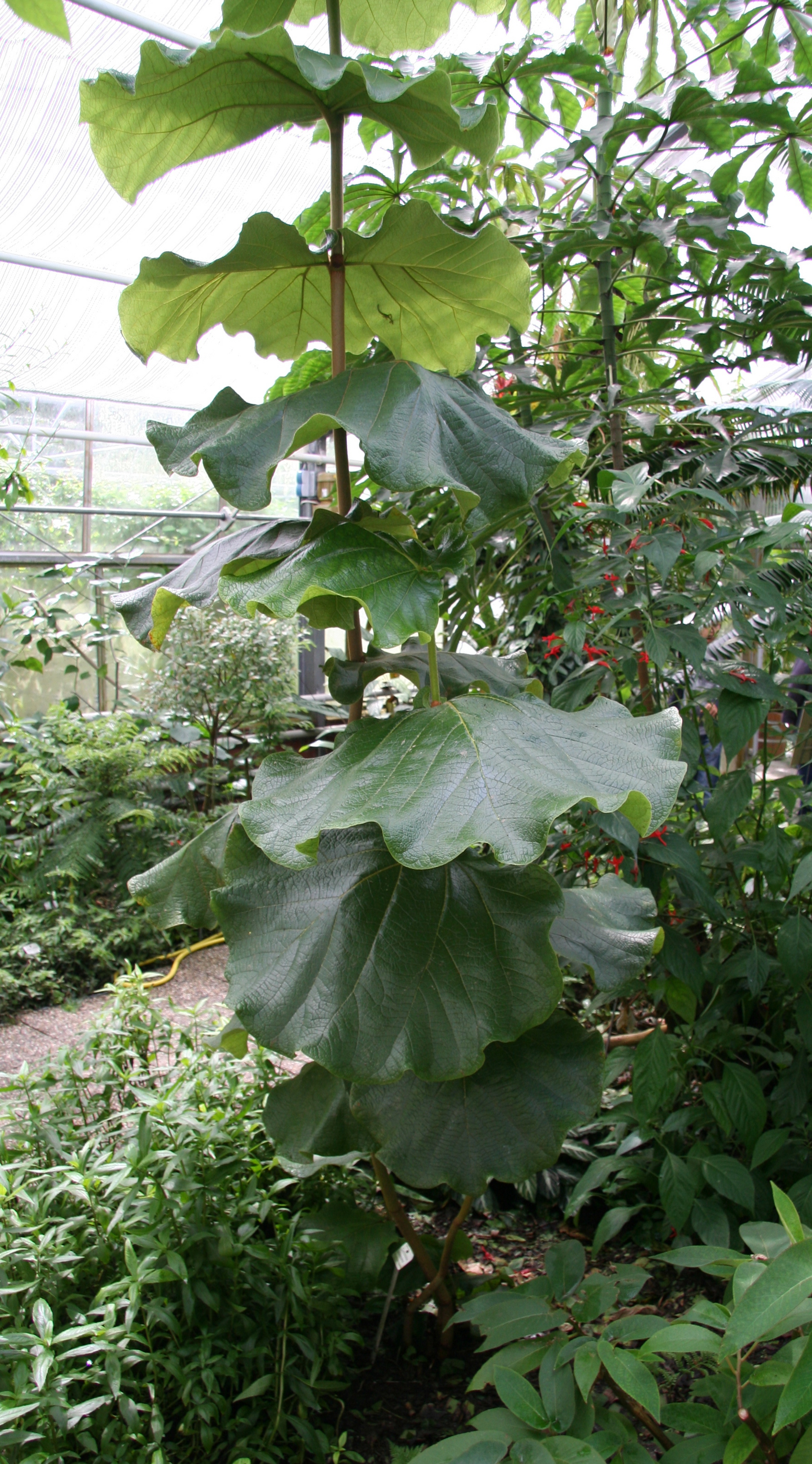 Coccoloba pubescens im Botanischen Garten Dresden